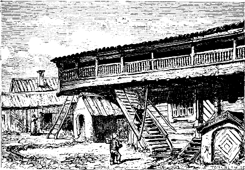 Kungsstugan i Örebro. Svalbyggnad från 1500-talet.